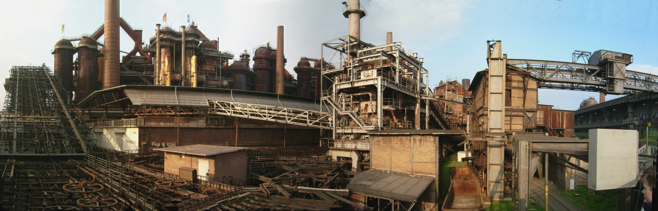 Außenansicht der Völklinger Hütte